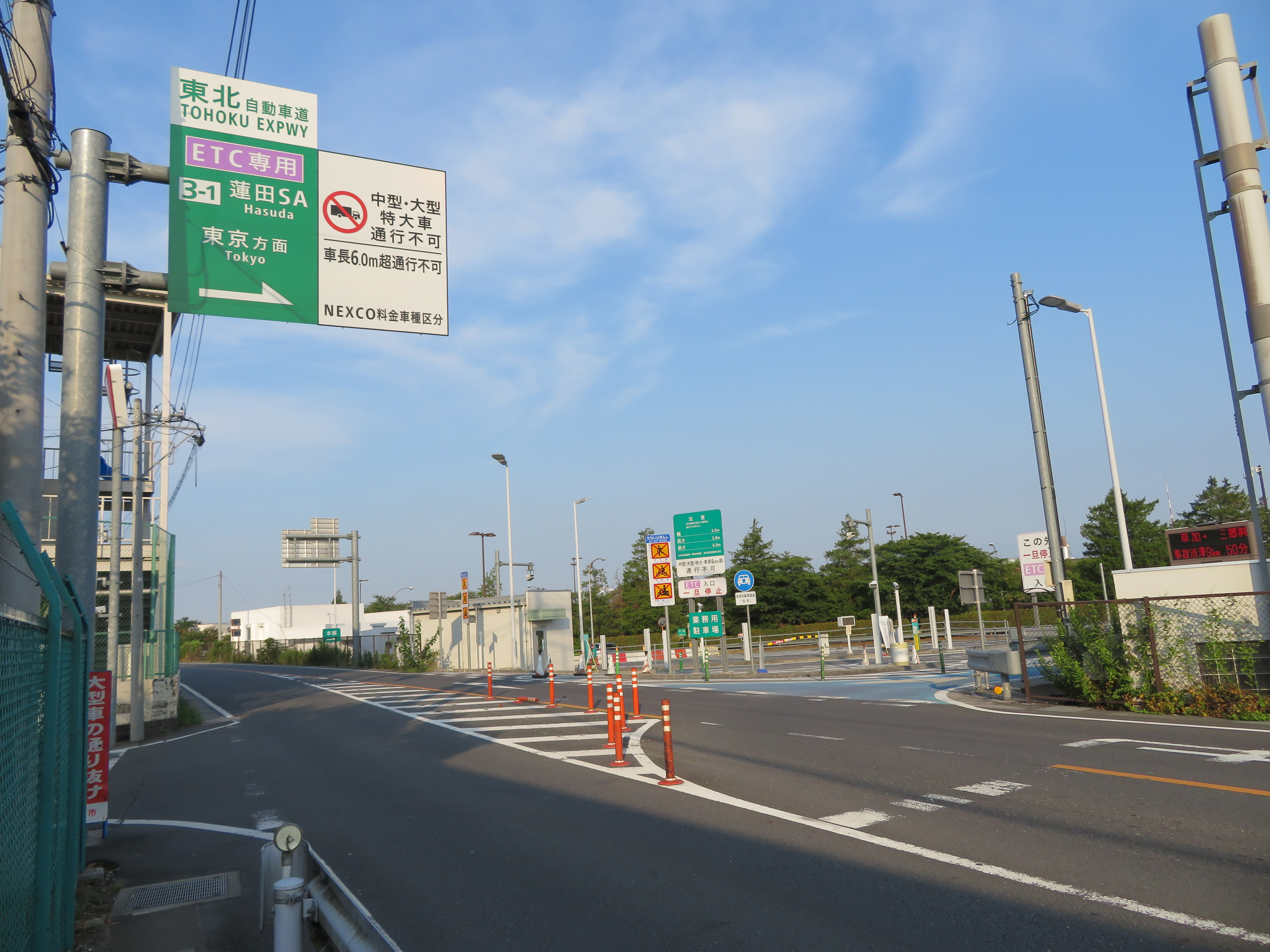 東北自動車道蓮田スマートインターチェンジ入口付近